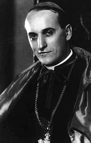 Kardinal Alojzije Stepinac